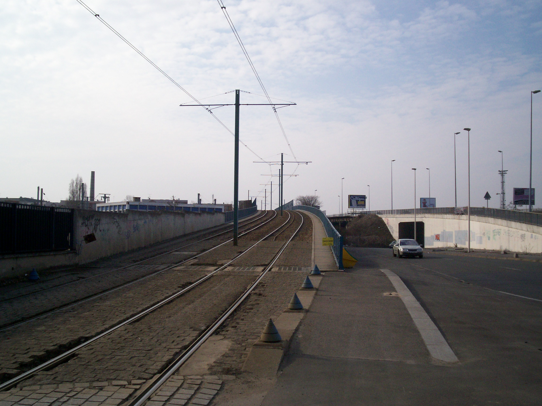 Pont à l'ouest de "Gaston Roulaud"